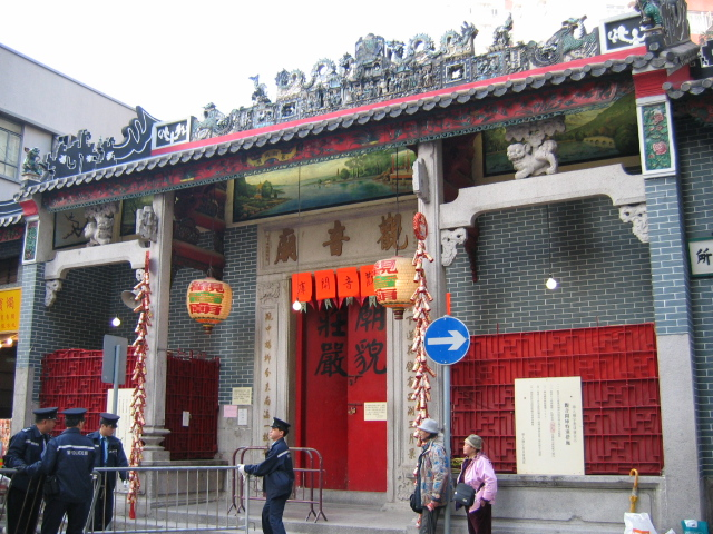 Kung Yum Temple, Hung Hom, Hong Kong